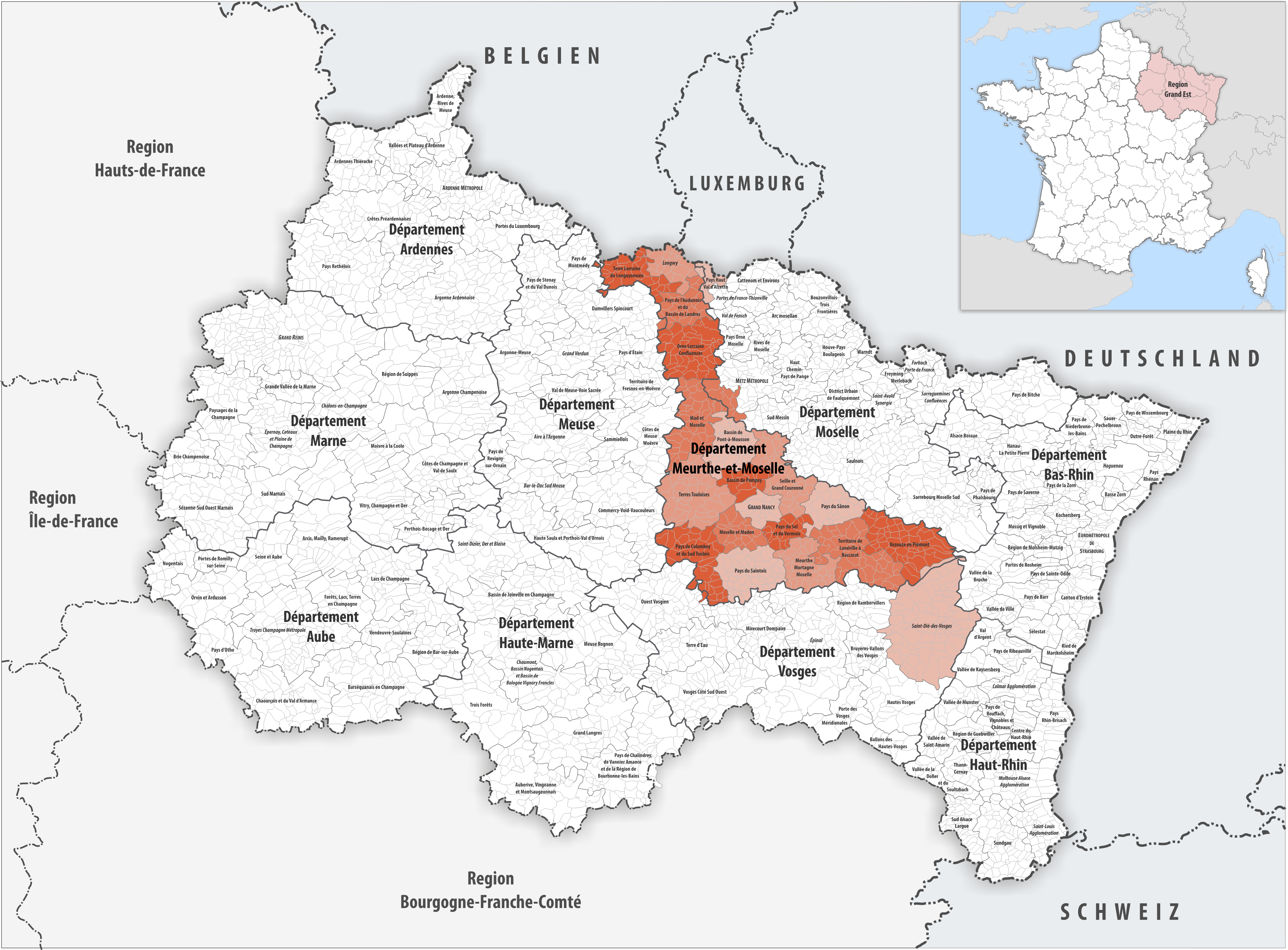 Gemeindeverbände im Département Meurthe-et-Moselle